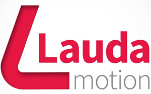 Logo von LaudaMotion (airline), Austria